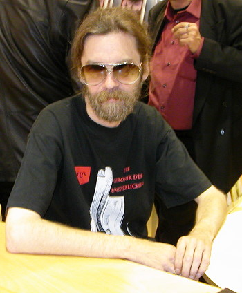 Wolfgang Hohlbein auf der Buchmesse 2003 in Frankfurt